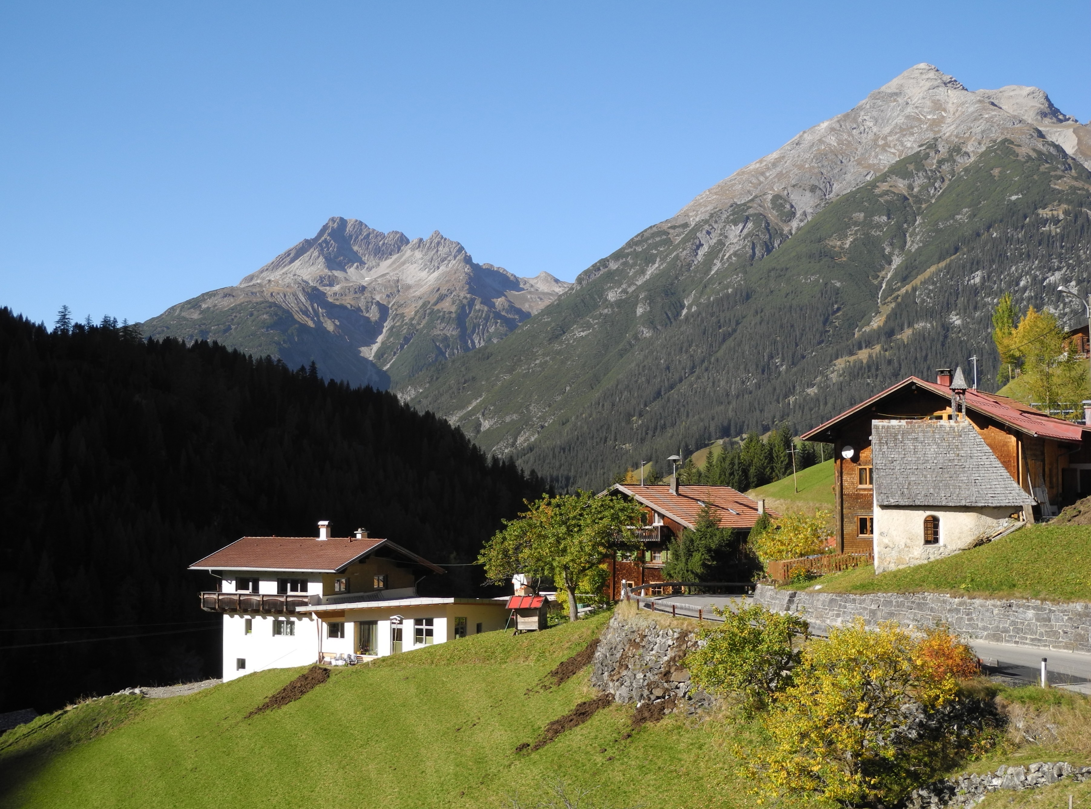 Kaisers - Ort mit Biberkopf und Ellbognerspitze